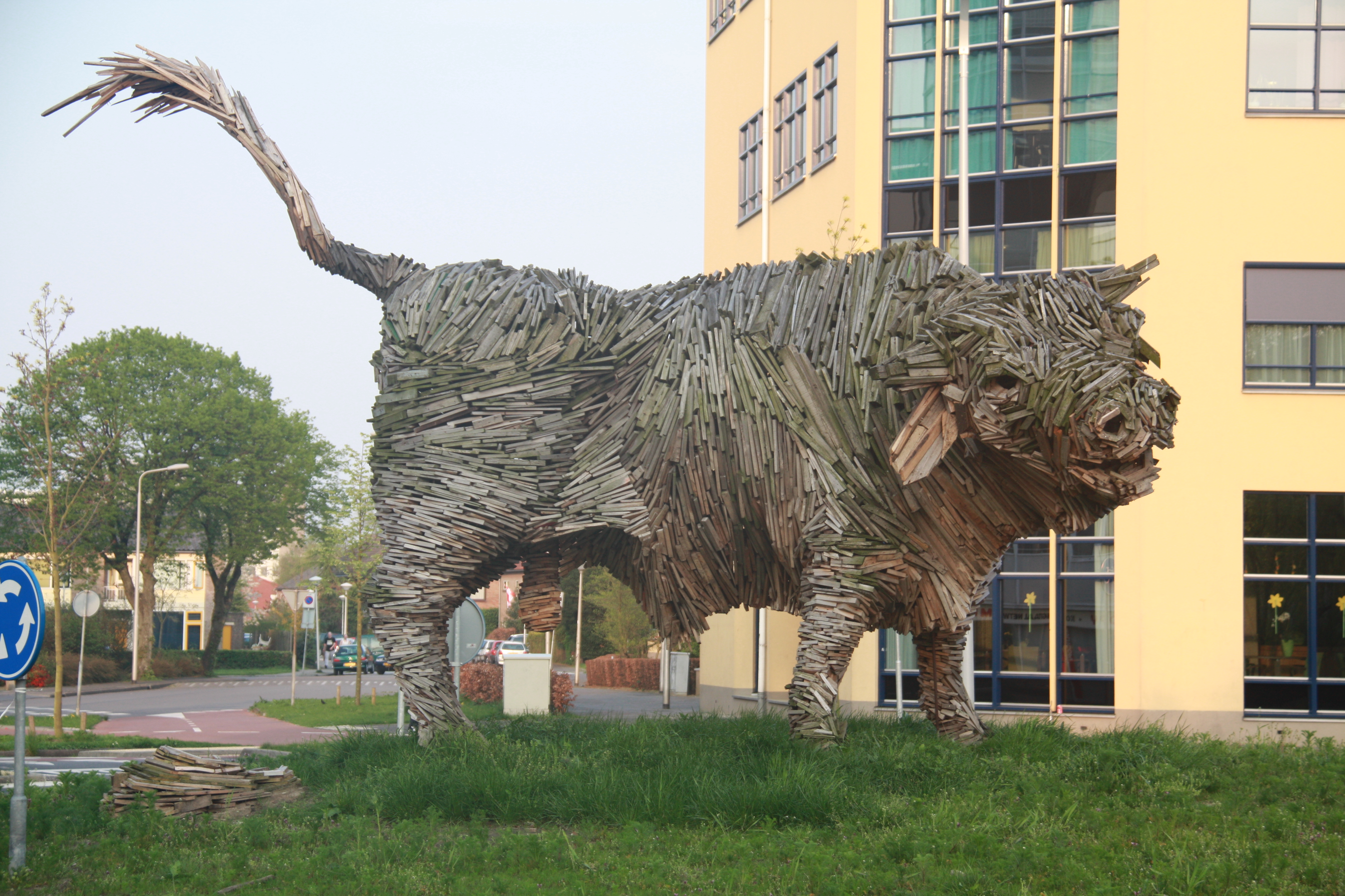 "De Stier" (2009) van Thijs Trompert een voormalig beeld in Amersfoort.